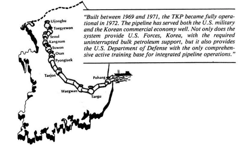 Tracé du Trans-Korea Pipeline en 1985 d'après le magazine "Fuel Line" du Defense Fuel Supply Center publié durant l'été 1985.